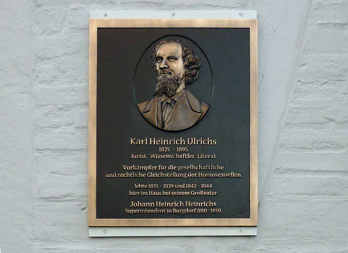 Gedenktafel für Karl Heinrich Ulrichs. Enthüllt wurde das Relief am 2. Dezember 2016 von Superintendentin Sabine Preuschoff-Kleinschmidt am Haus der Superintendentur am Spittaplatz 3 in Burgdorf (bei Hannover).